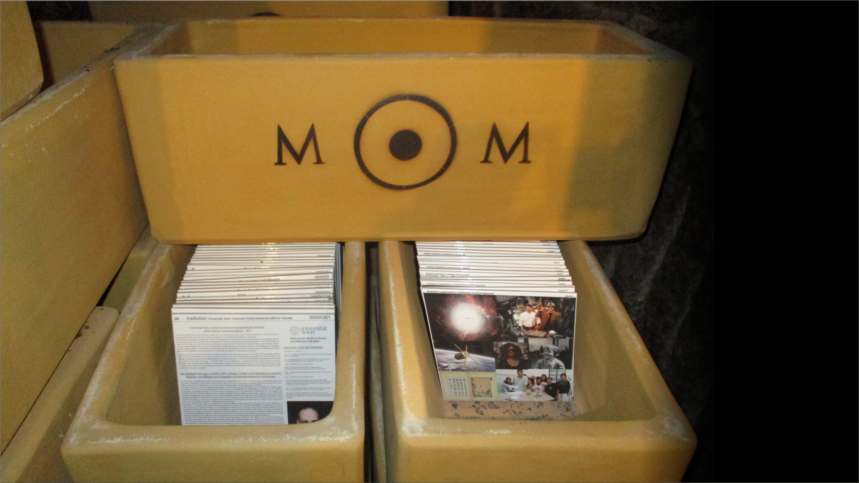 Container mit Keramiktafeln des Memory of Mankind Projektes.